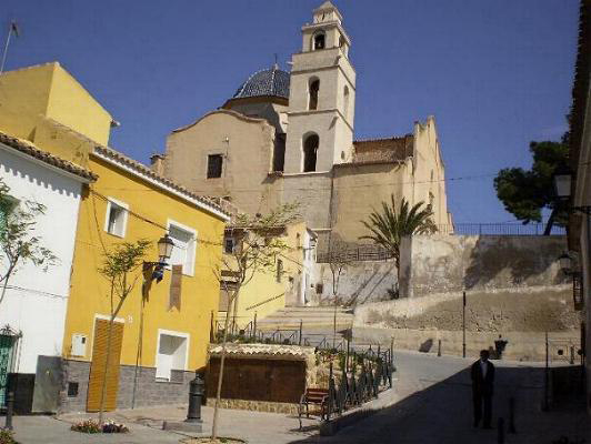 Barrio de La Morería de Monforte del Cid